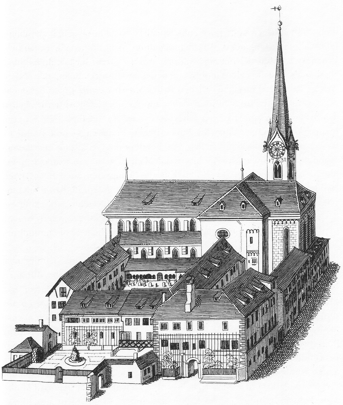 Ansicht der Fraumünsterkirche und der Abteigebäude in Zürich um ca. 1750.